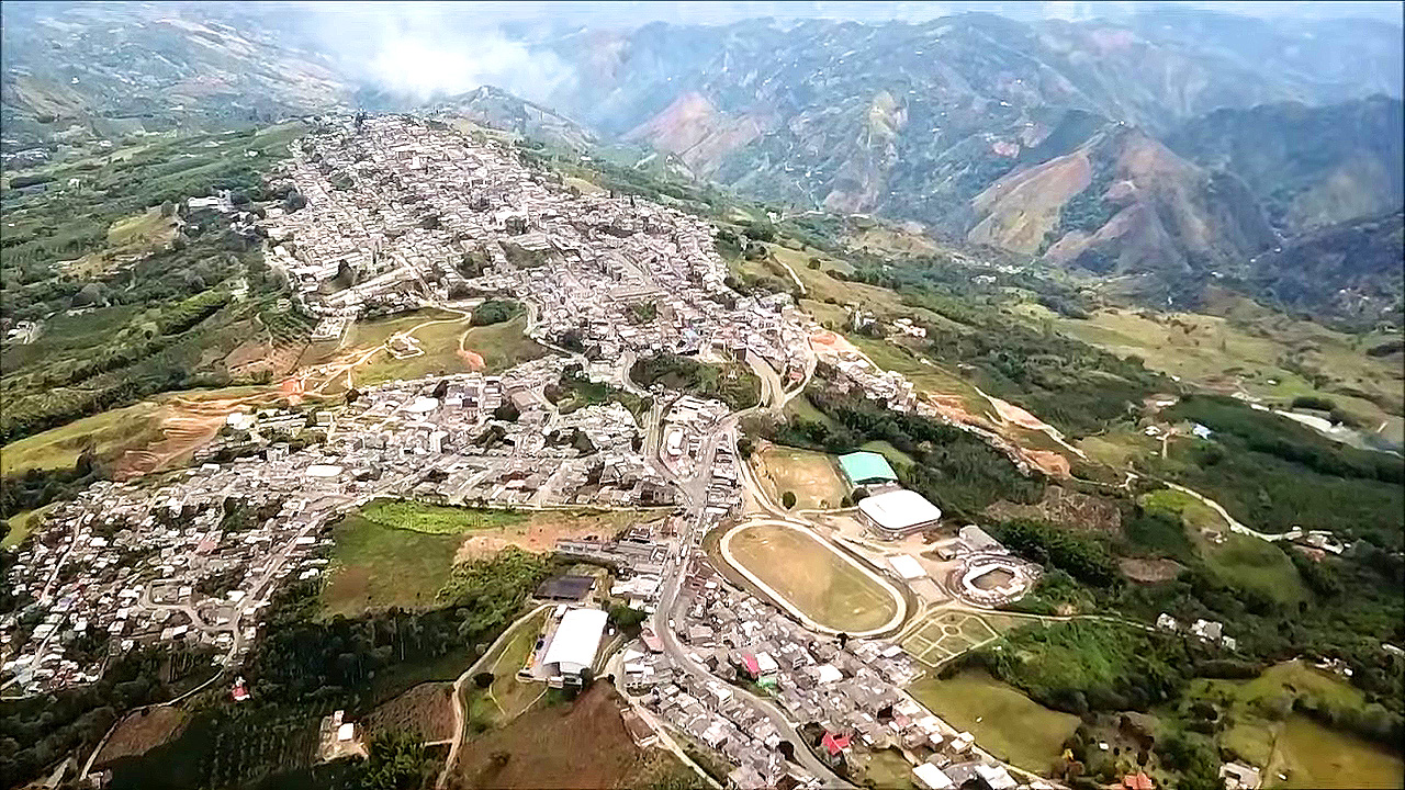 Imagen aérea de Anserma(Caldas) - Colombia